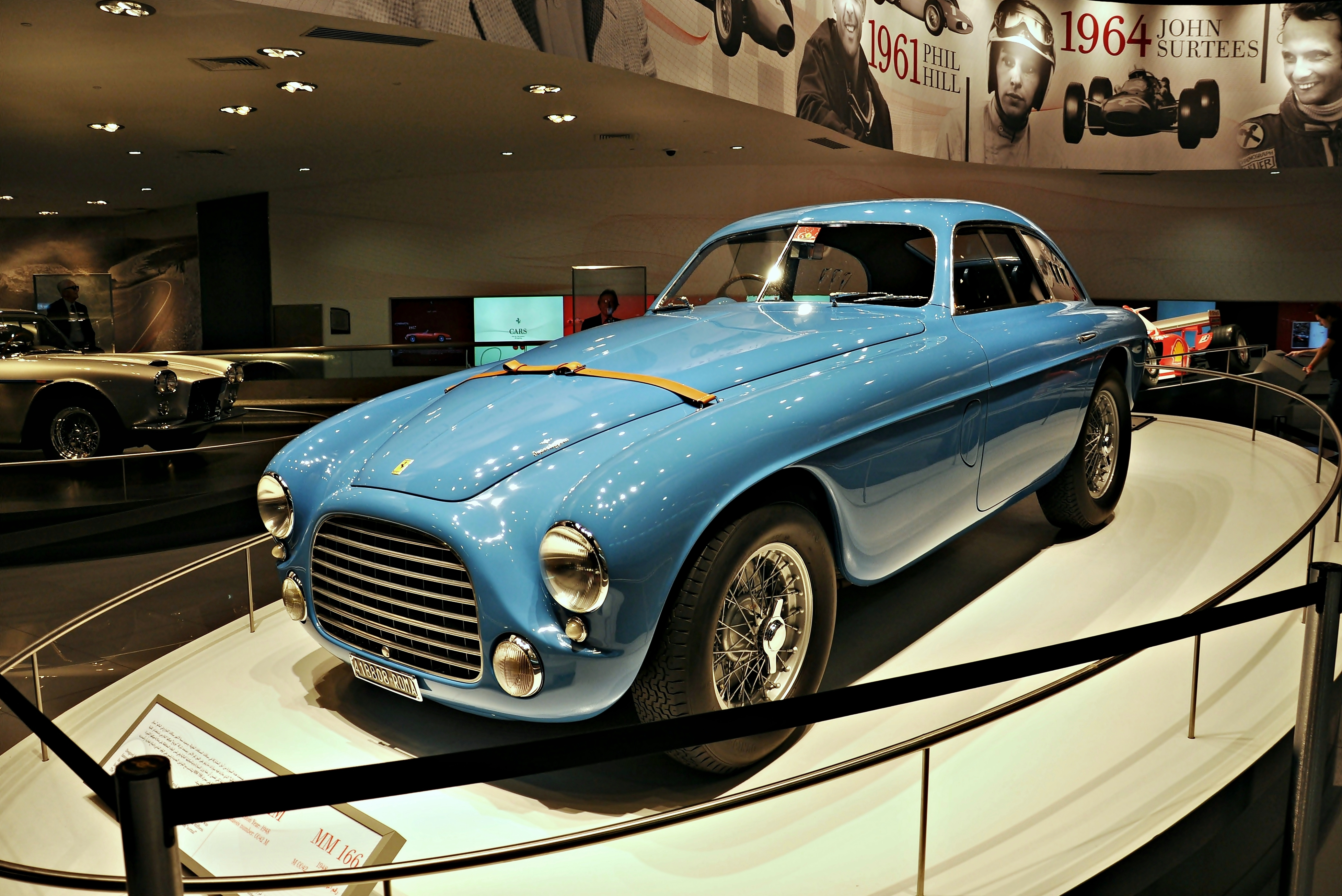 emiratos arabes